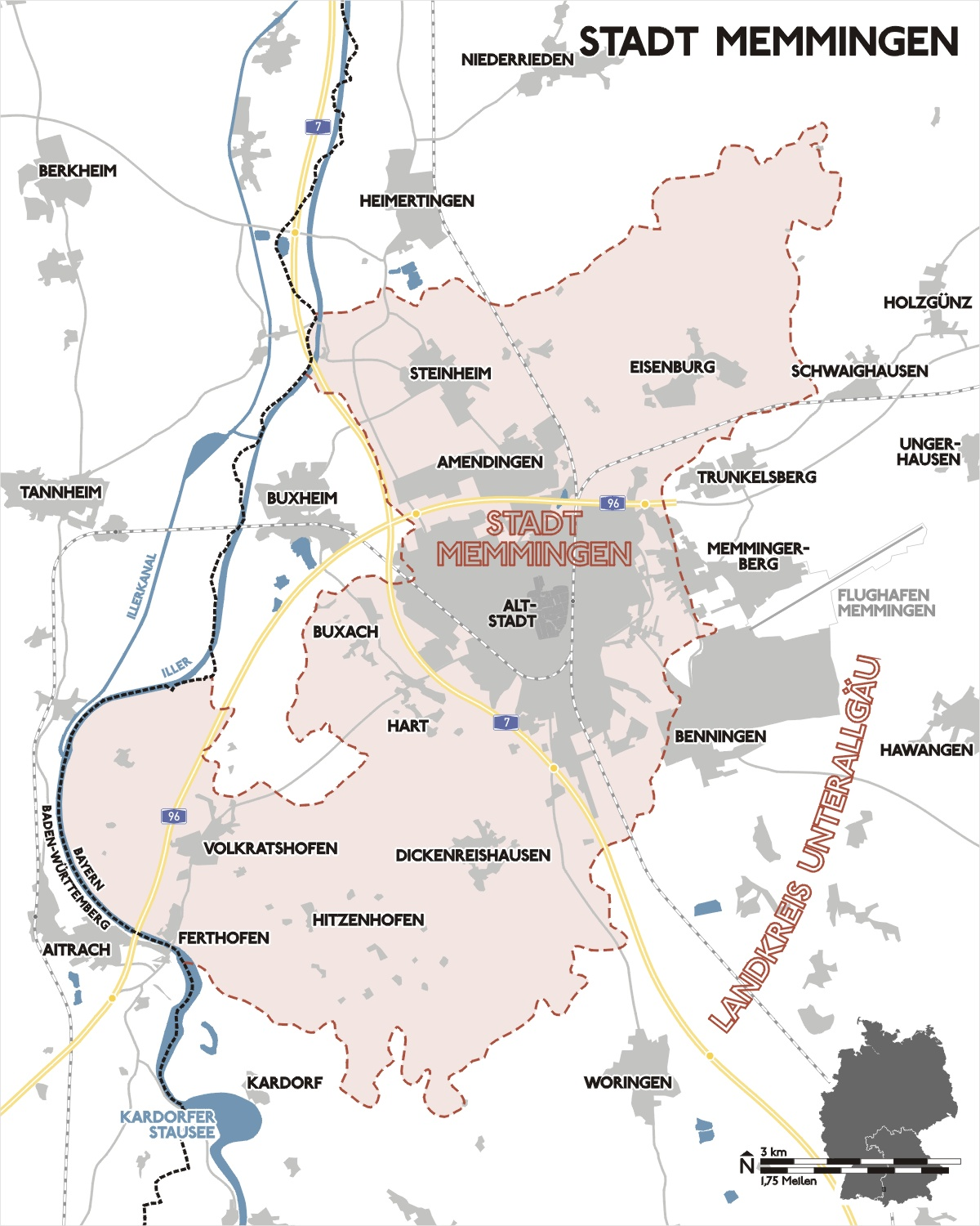 Karte von Memmingen und Umgebung